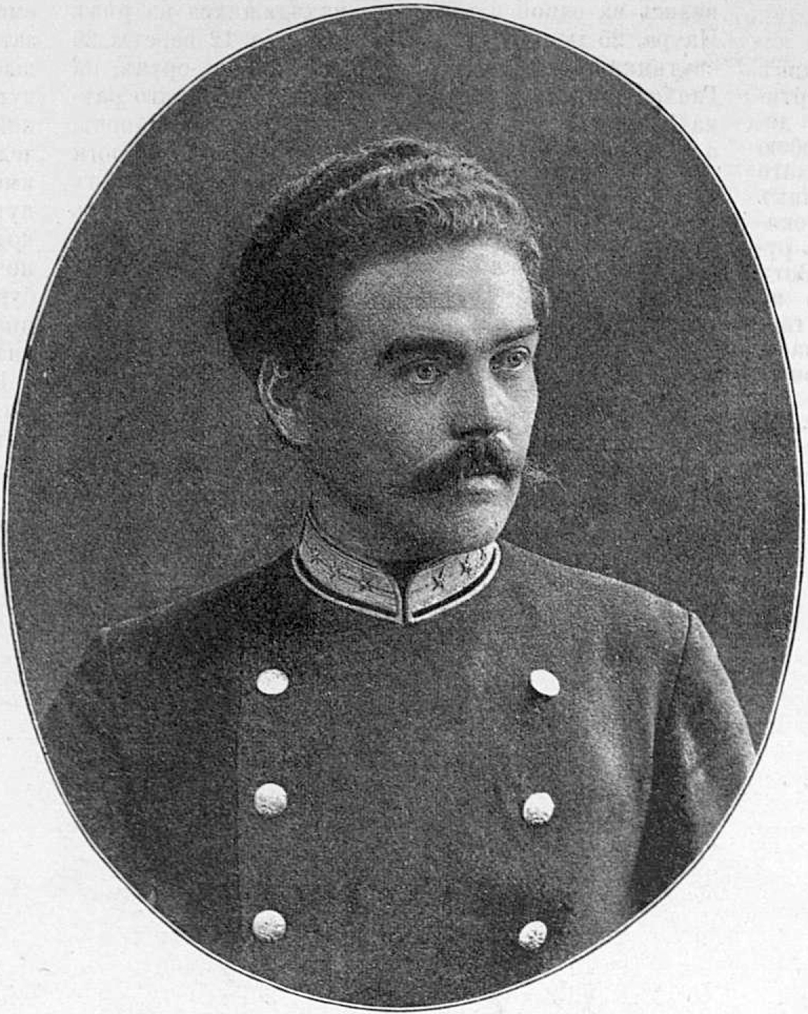 Пастухов Андрей Васильевич, альпинист